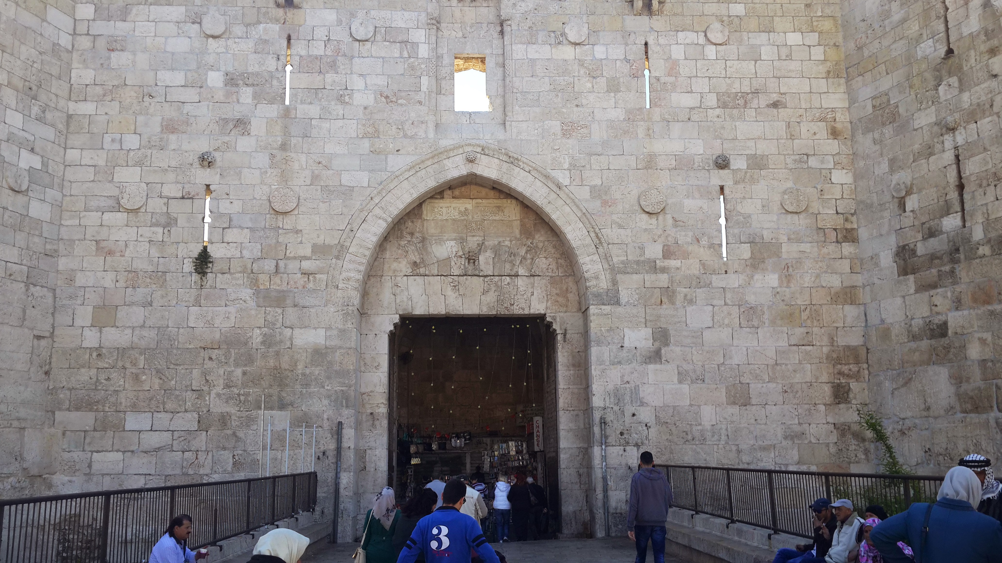 Старый Город в Иерусалиме. Шхемские ворота (снаружи)